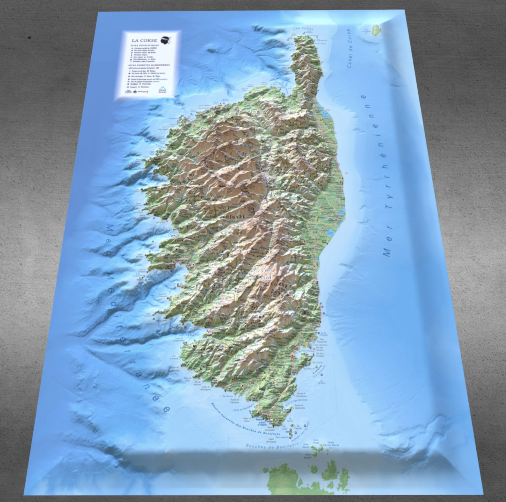 Modèle 3D d'une carte en relief de la corse servant à la fabrication des cartes de la société 3Dmap